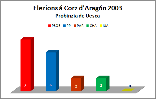 Aragonés: Grafico d'as elezions á Corz d'Aragón de la añada 2003. Resultatos d'a probinzia de Uesca